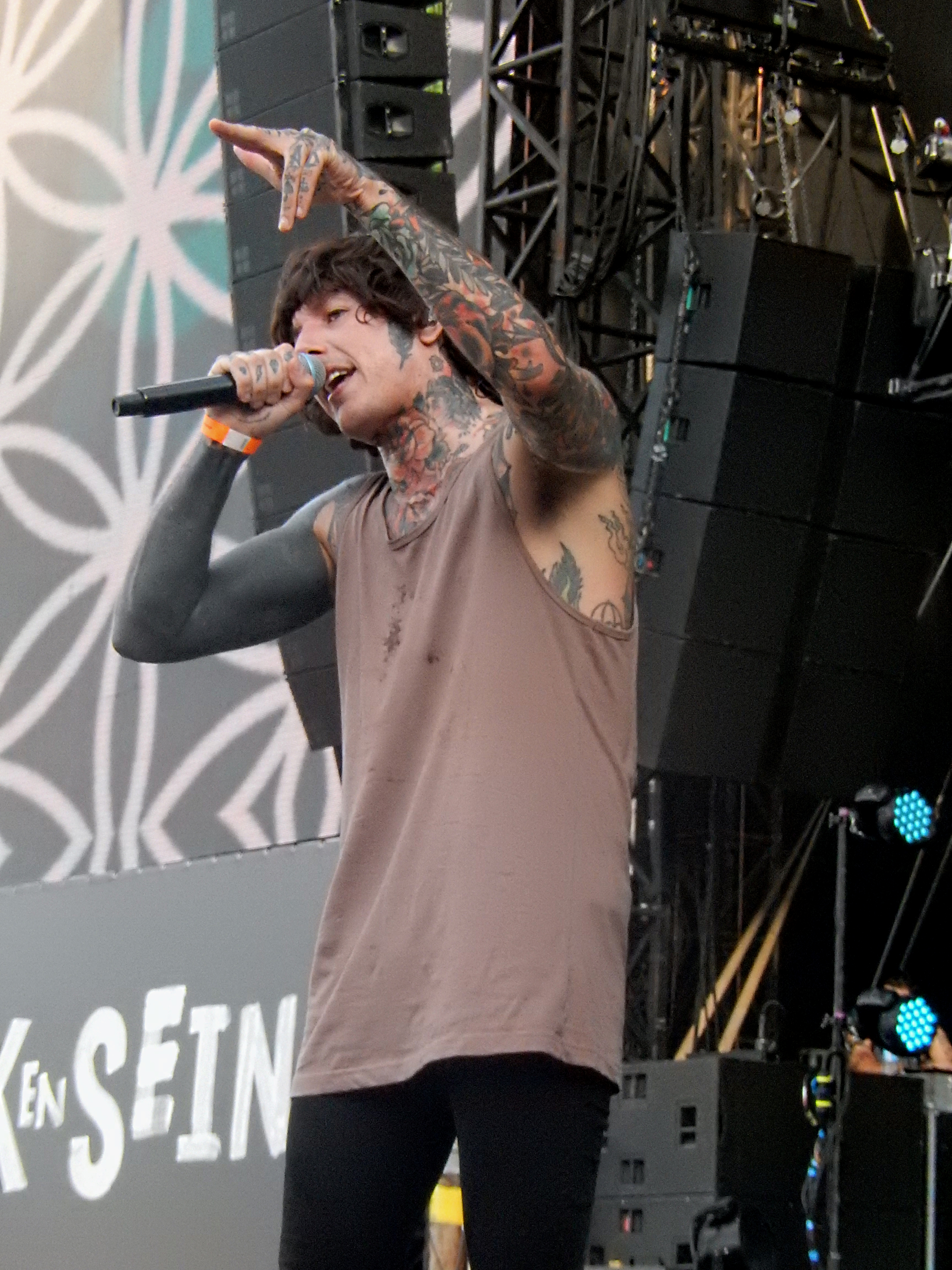 Bring Me The Horizon, Rock en Seine 2016, Paris